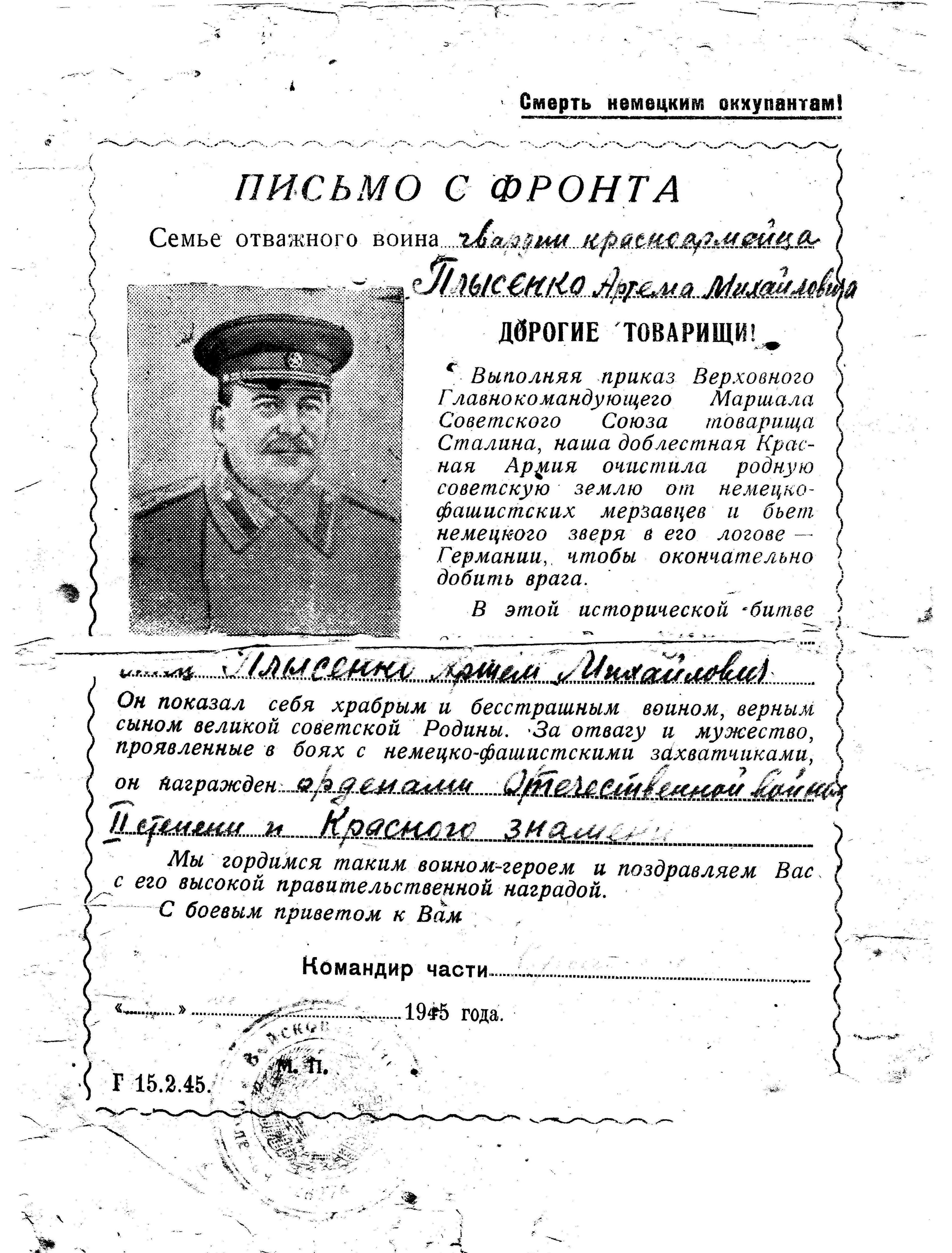 Скан-копия письма с фронта в черно-белом формате